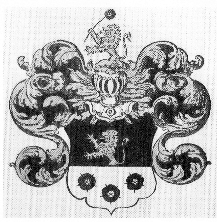 Het wapen van het geslacht Bout van Lieshout